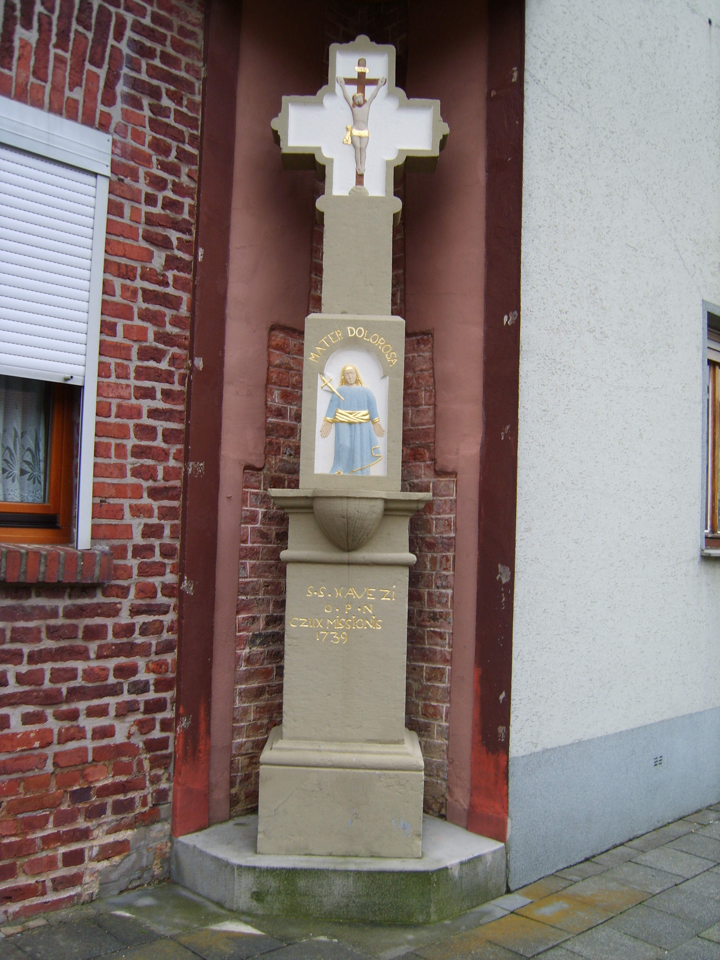 Wegkreuz "Mater dolorosa" in Fronhoven bei Eschweiler in der Städteregion Aachen